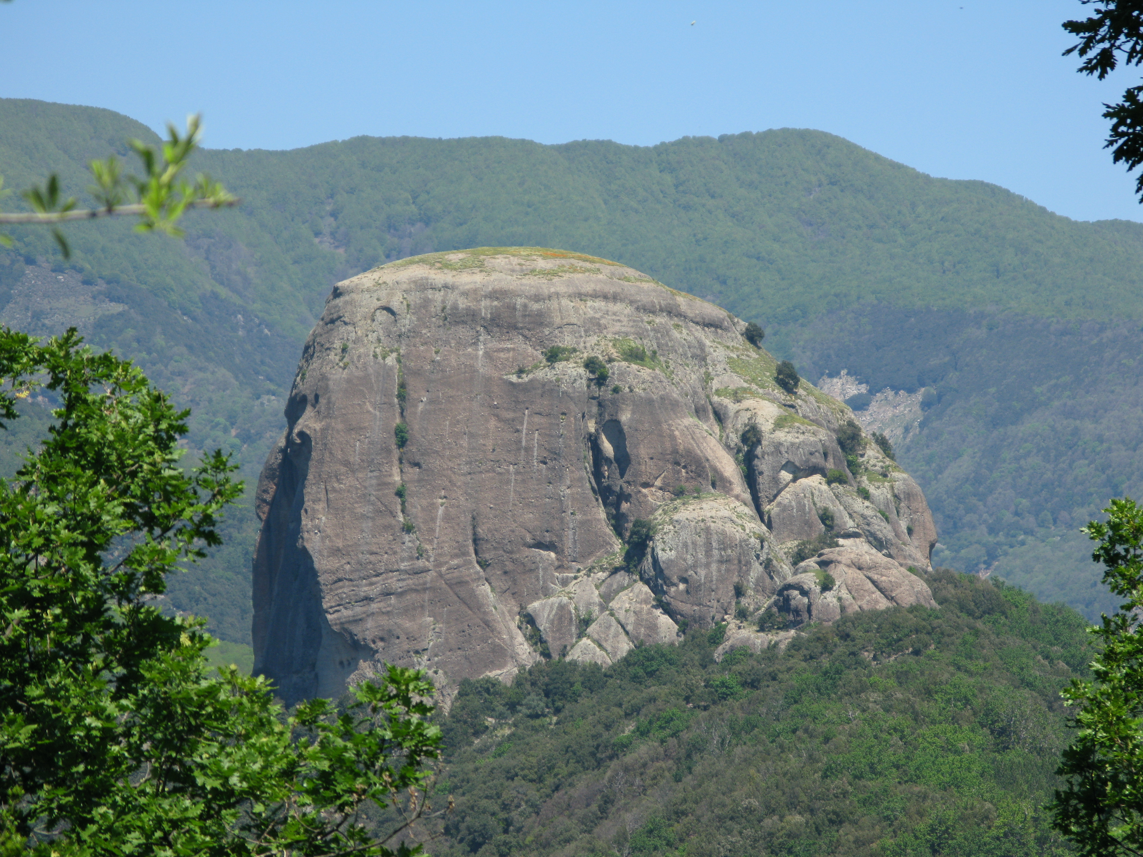 Pietra Cappa (Parco Nazionale dell'Aspromonte) - San Luca (Reggio Calabria)